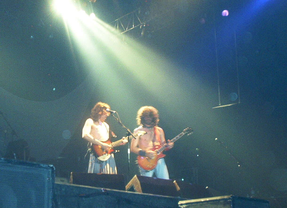 Extremoduro actuando en 2002